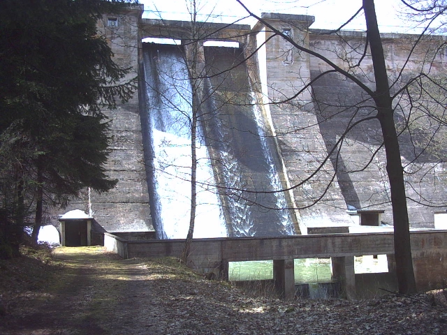 unter Lütsche-Staumauer